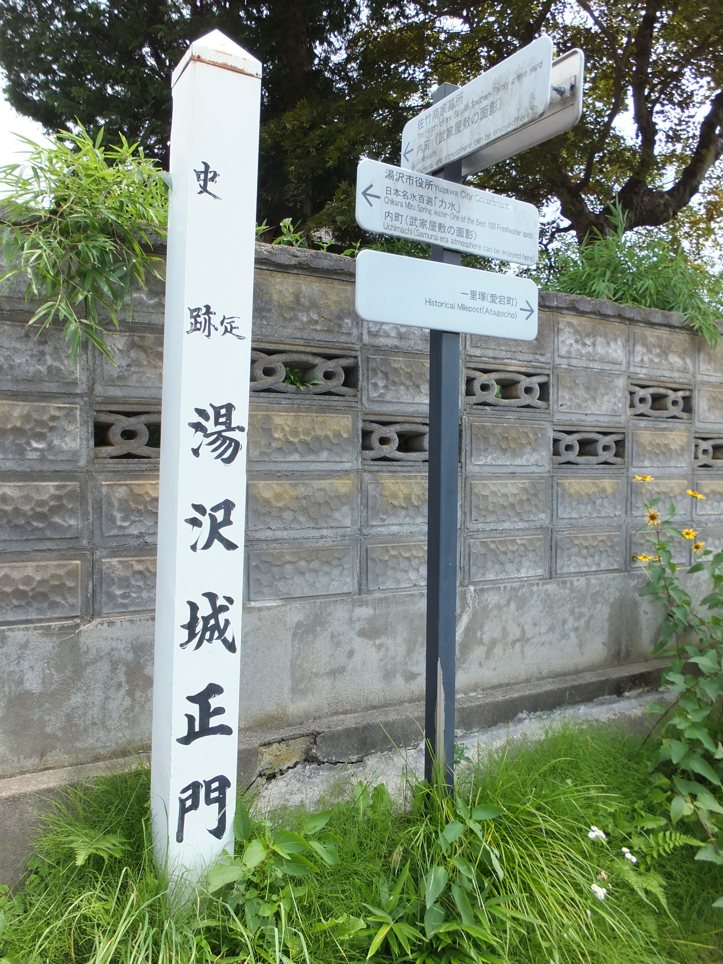 湯沢城跡を示す標識。遺構はほとんど残っていない。